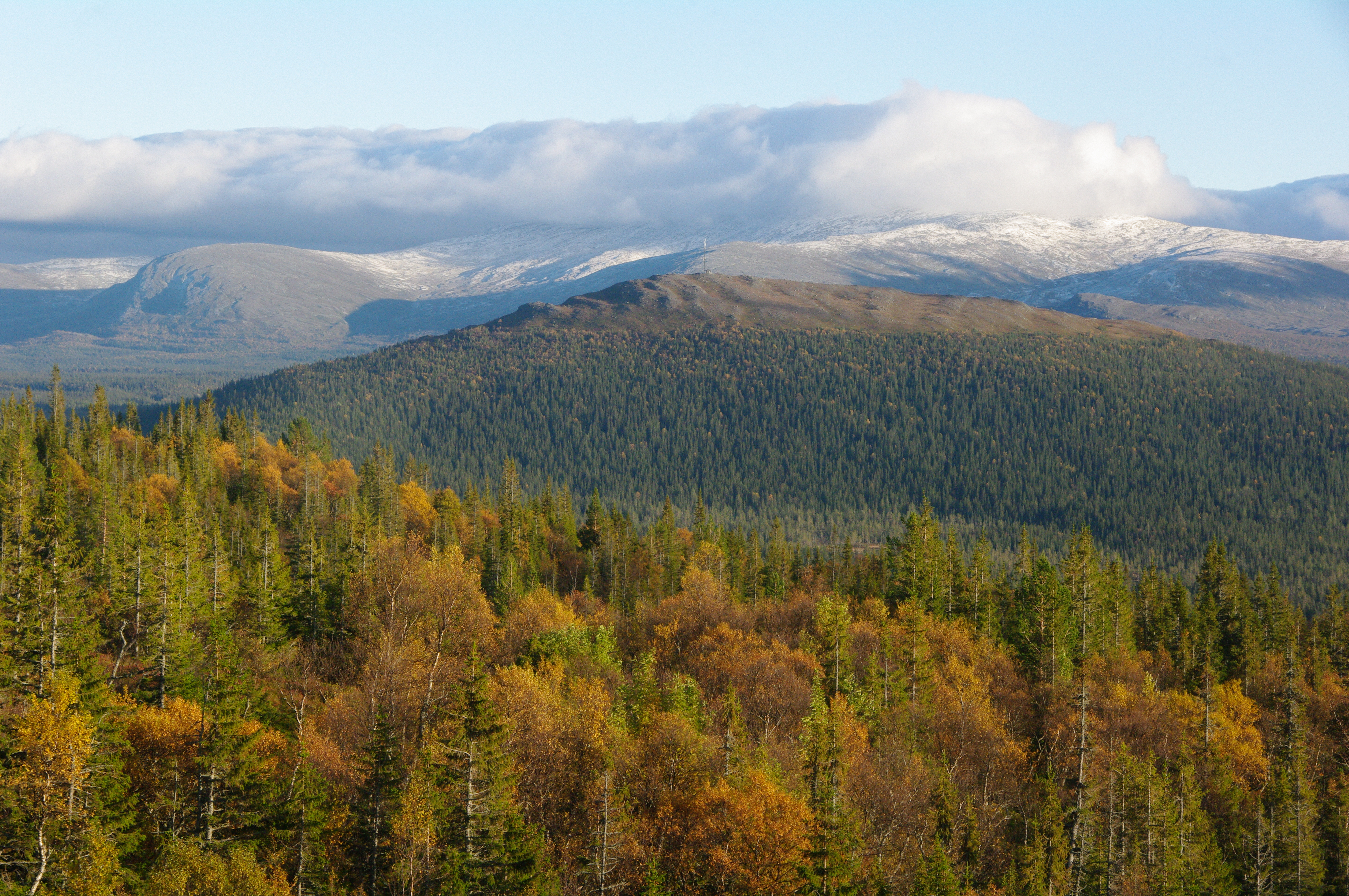 Anarisfjällen Vålådalens Naturreservat